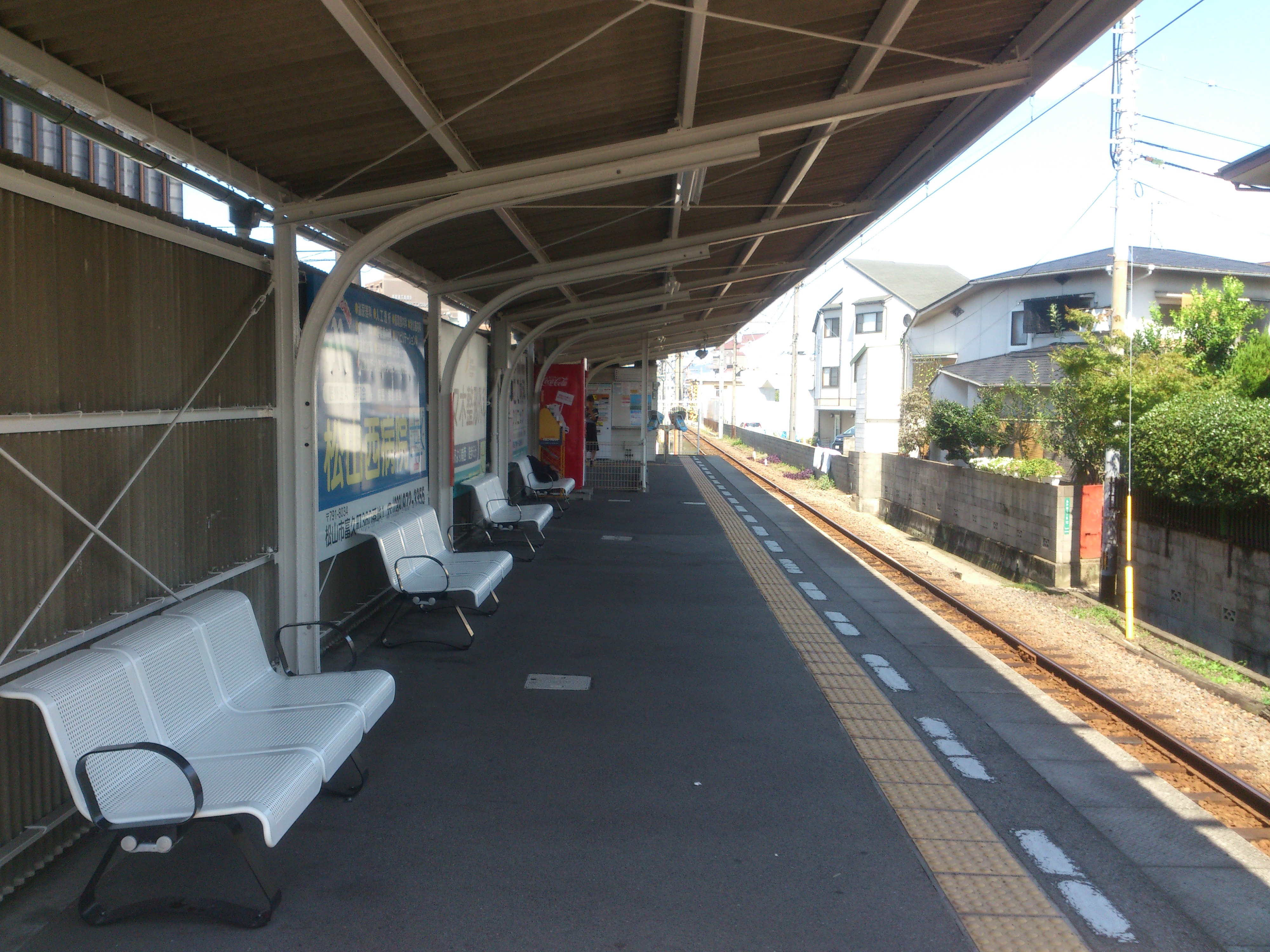 鎌田駅のホーム